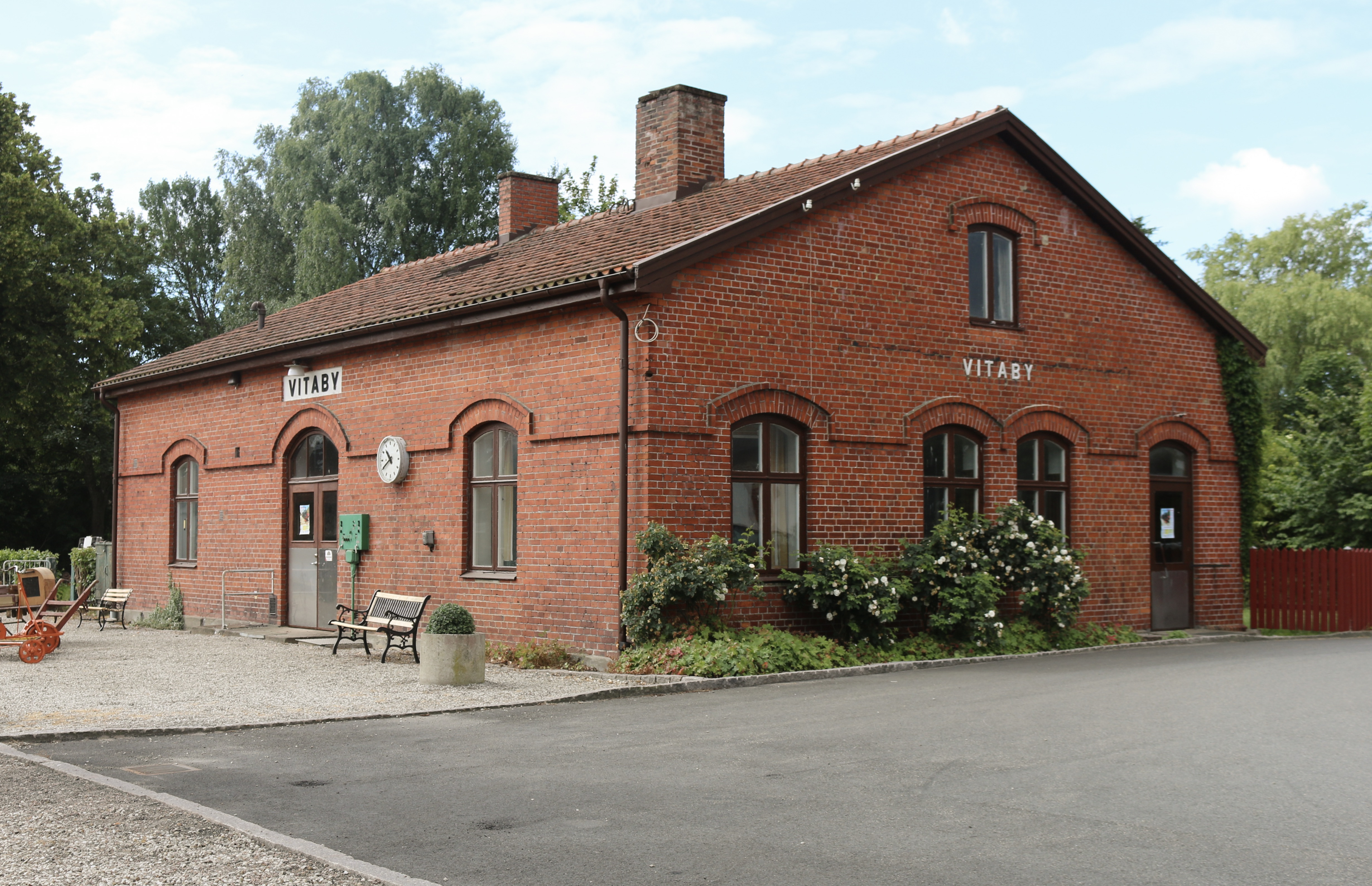 Vitaby station